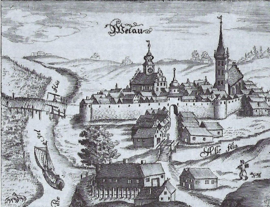 Stich von Wehlau zwischen Alle und Pregel, links Rathaus, rechts St. Jacobi